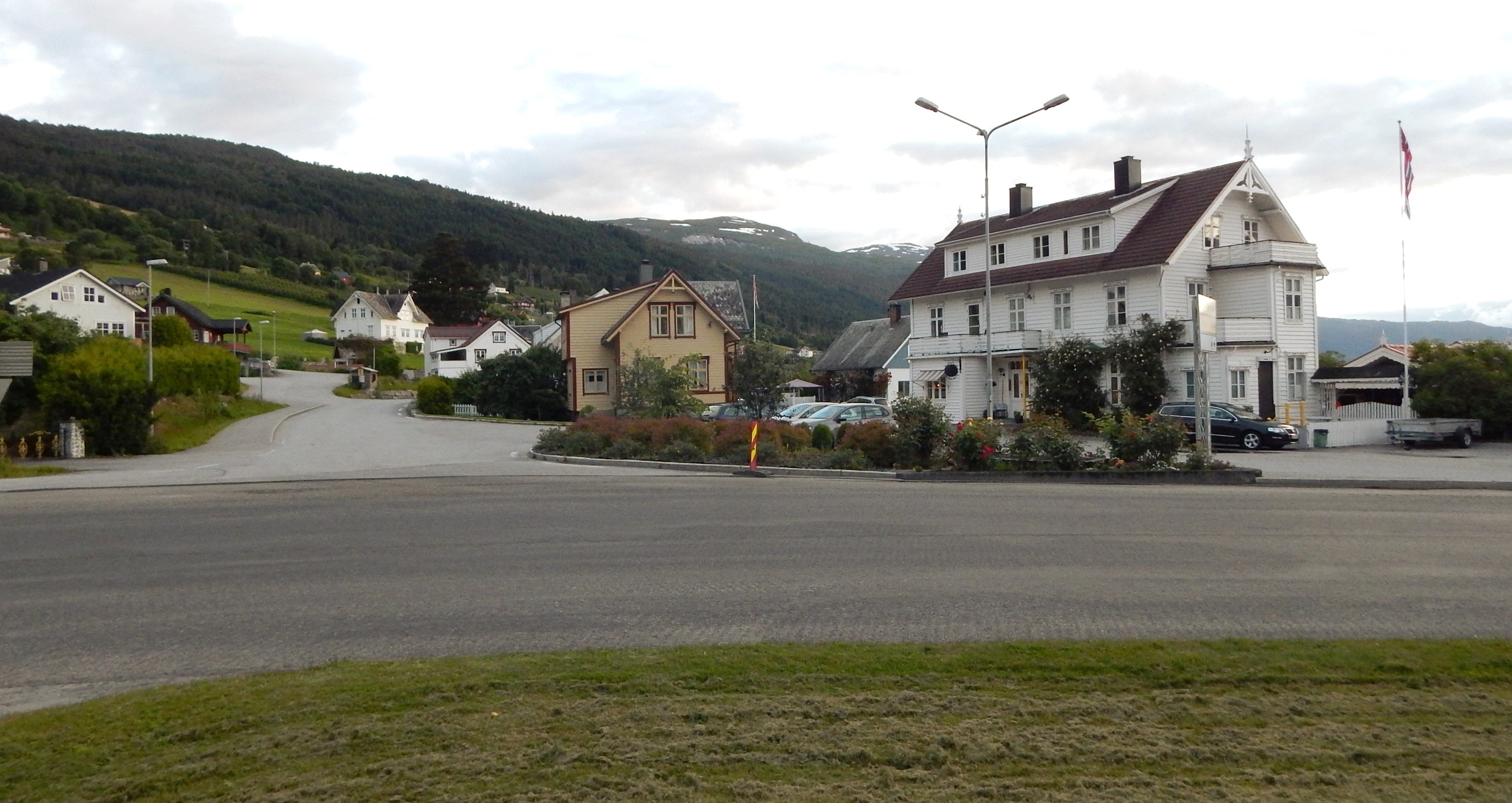 Tistamvegen (fylkesvei 5725, tidl. 725) tar av fra fylkesvei 60 i Utvik